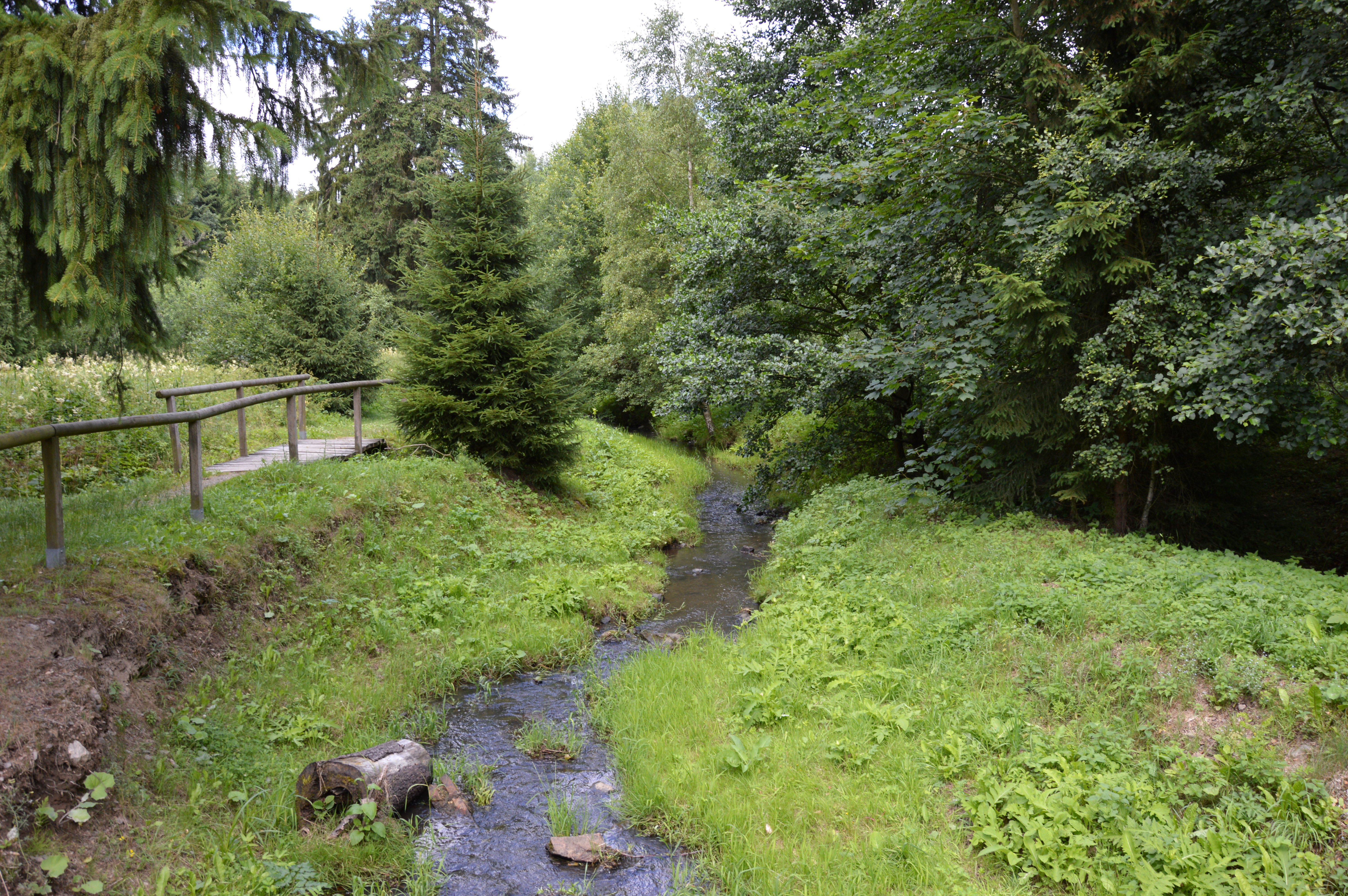 Katzsohlbach